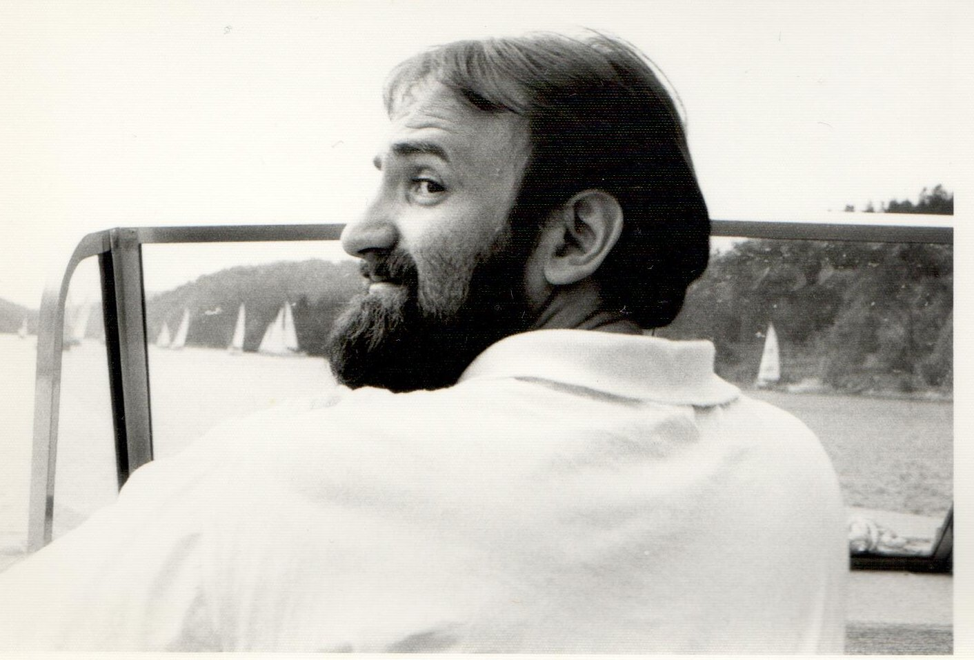 S. Novotný v roce 1994 na člunu u poříční policie Slapy